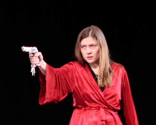 Мария Голубкина в спектакле «Любовь длинною в ночь» на сцене Северодвинского театра драмы